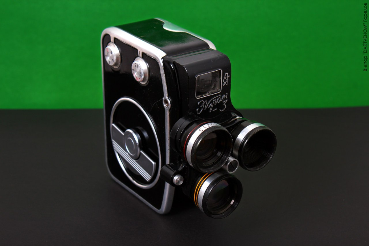 Кинокамера «Экран-3»